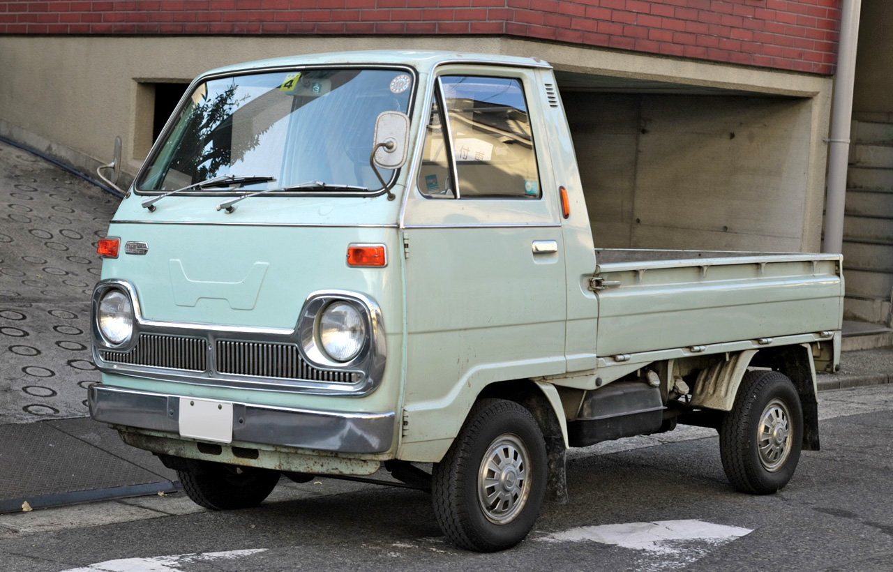 Honda TN-III